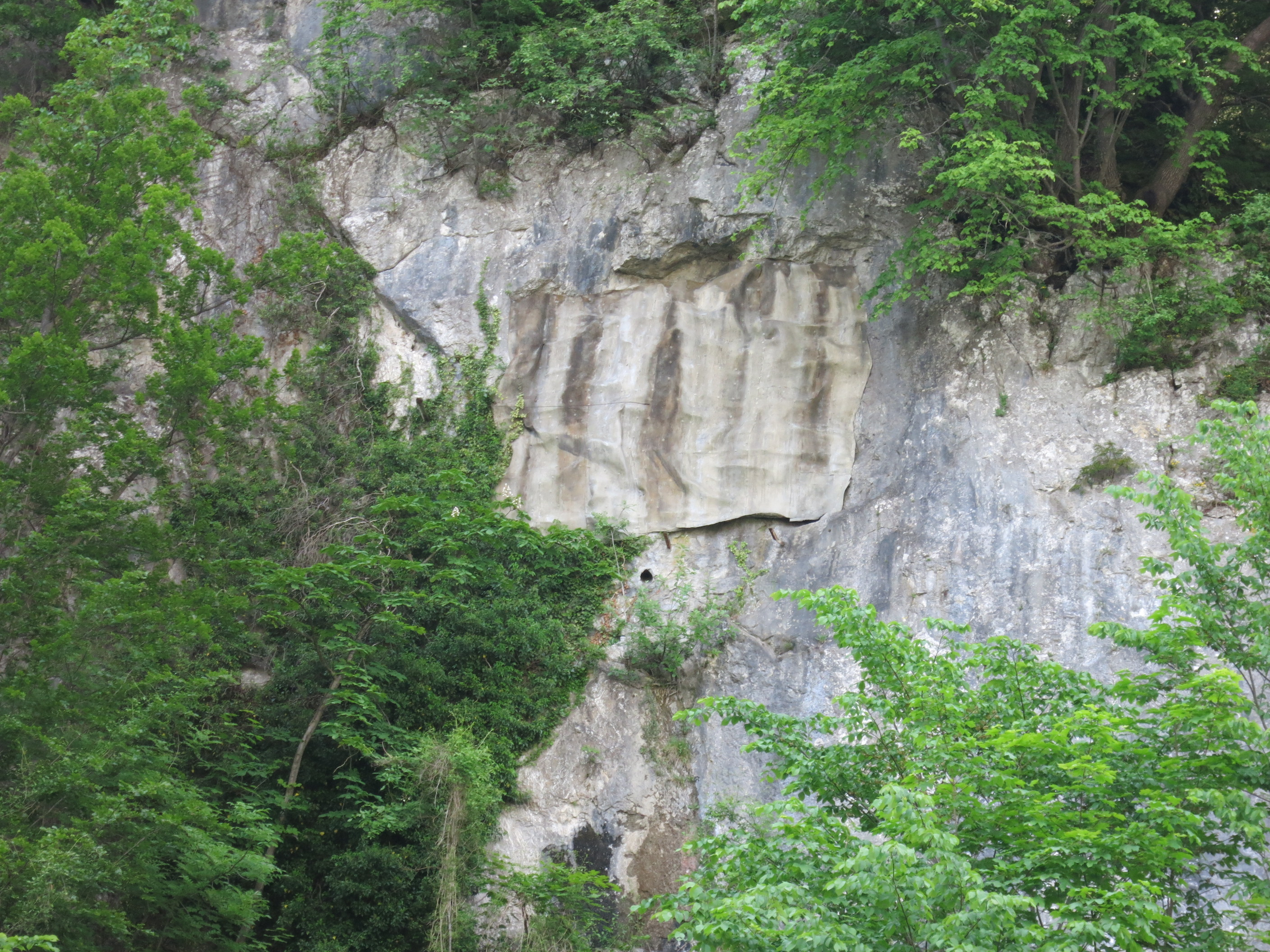 Artilleriewerk Kilchlidossen, Stansstaad NW, Schweiz